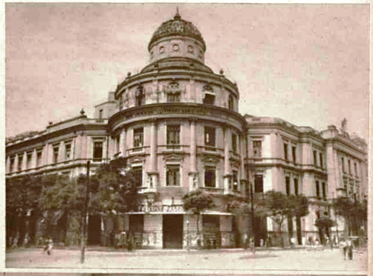 Palácio da livraria Freitas Bastos na revisa O malho em 1939.